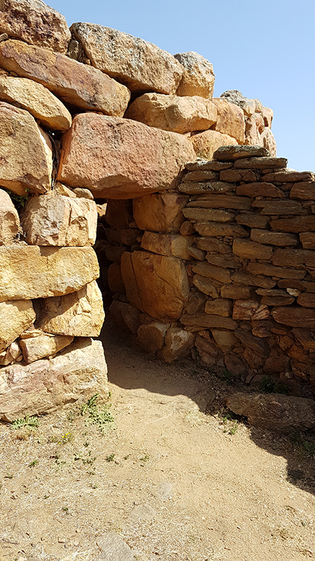 Nuraghe San Pietro